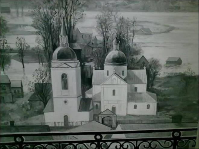 Беларуская (тарашкевіца): Магілёў (Mahiloŭ), вуліца Пакроўская (vulica Pakroŭskaja). Царква Покрыва Прасьвятой Багародзіцы